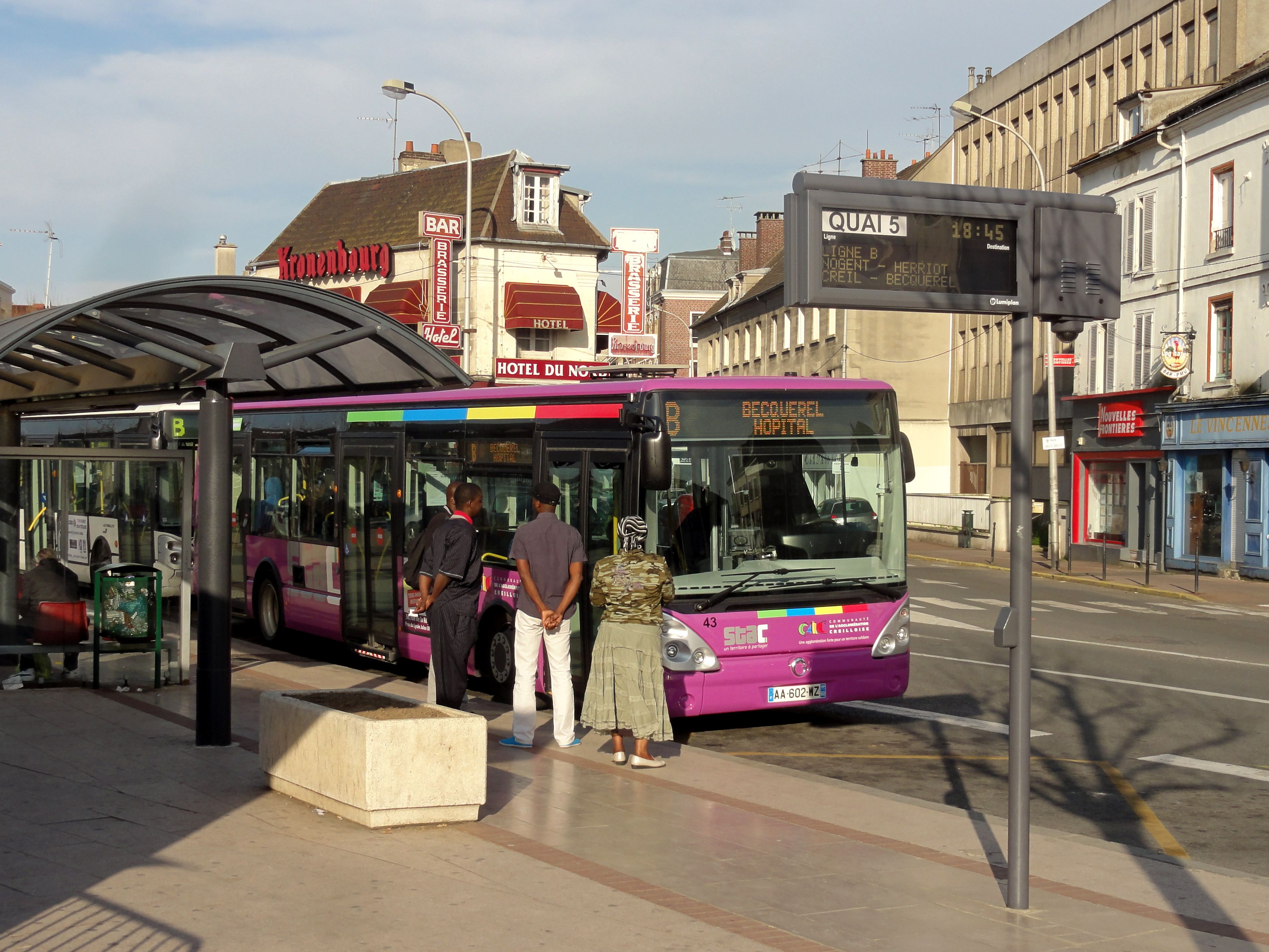 Arrêt de bus de la gare SNCF. Les autocars (sauf la ligne Picardie-Roissy) ne partent pas ici, mais de la gare routière à 300 m de distance.